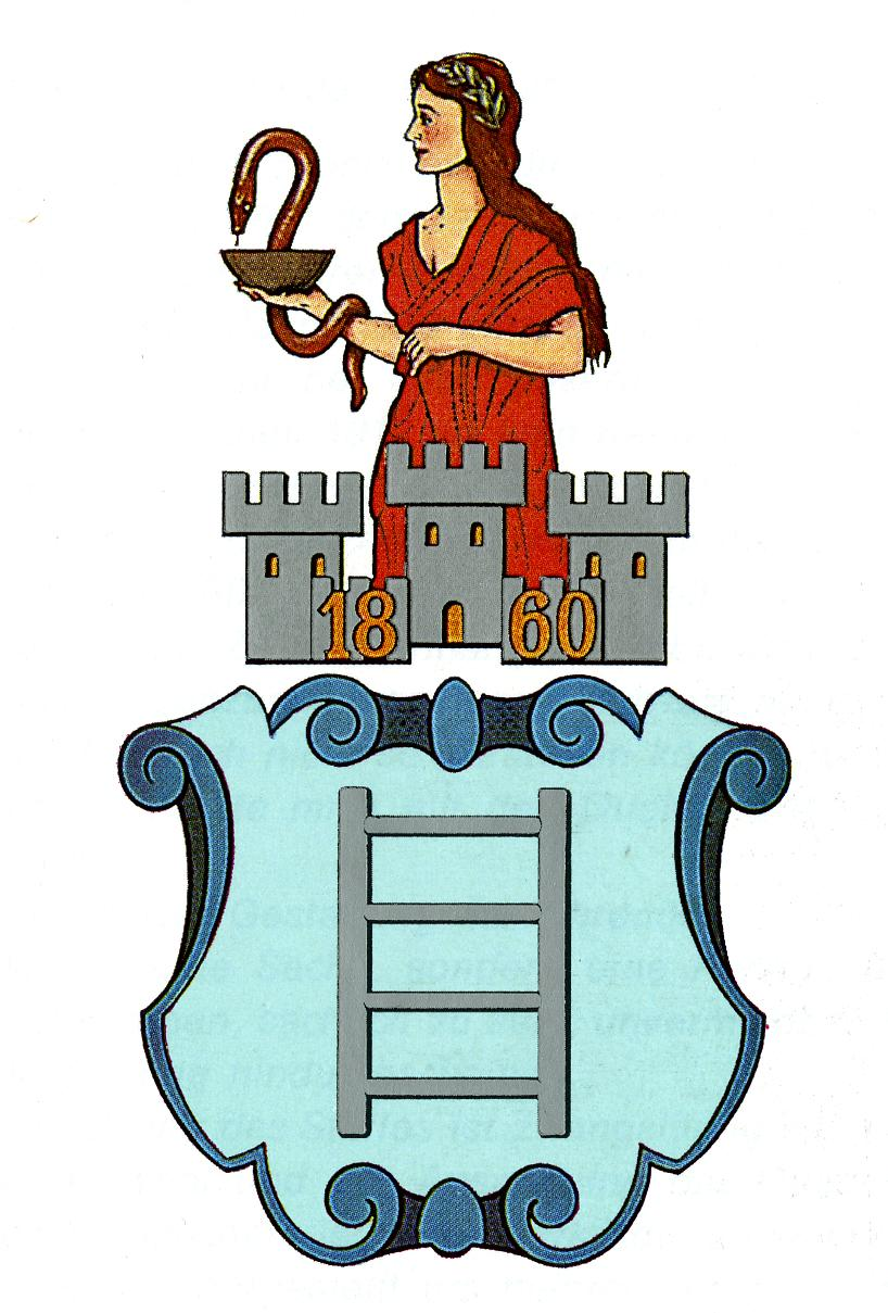 Außer Kraft gesetztes Wappen der Stadt Bad Oeynhausen, Kreis Minden, Nordrhein-Westfalen. (Verliehen durch königliche Kabinettsorder vom 13. Juni 1863)